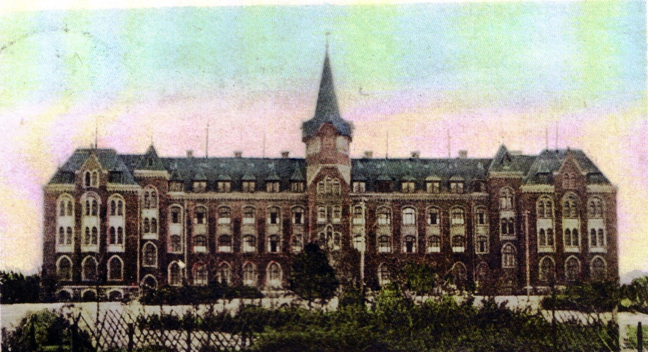 Kloster Oeventrop, kolorierte Postkarte um 1907